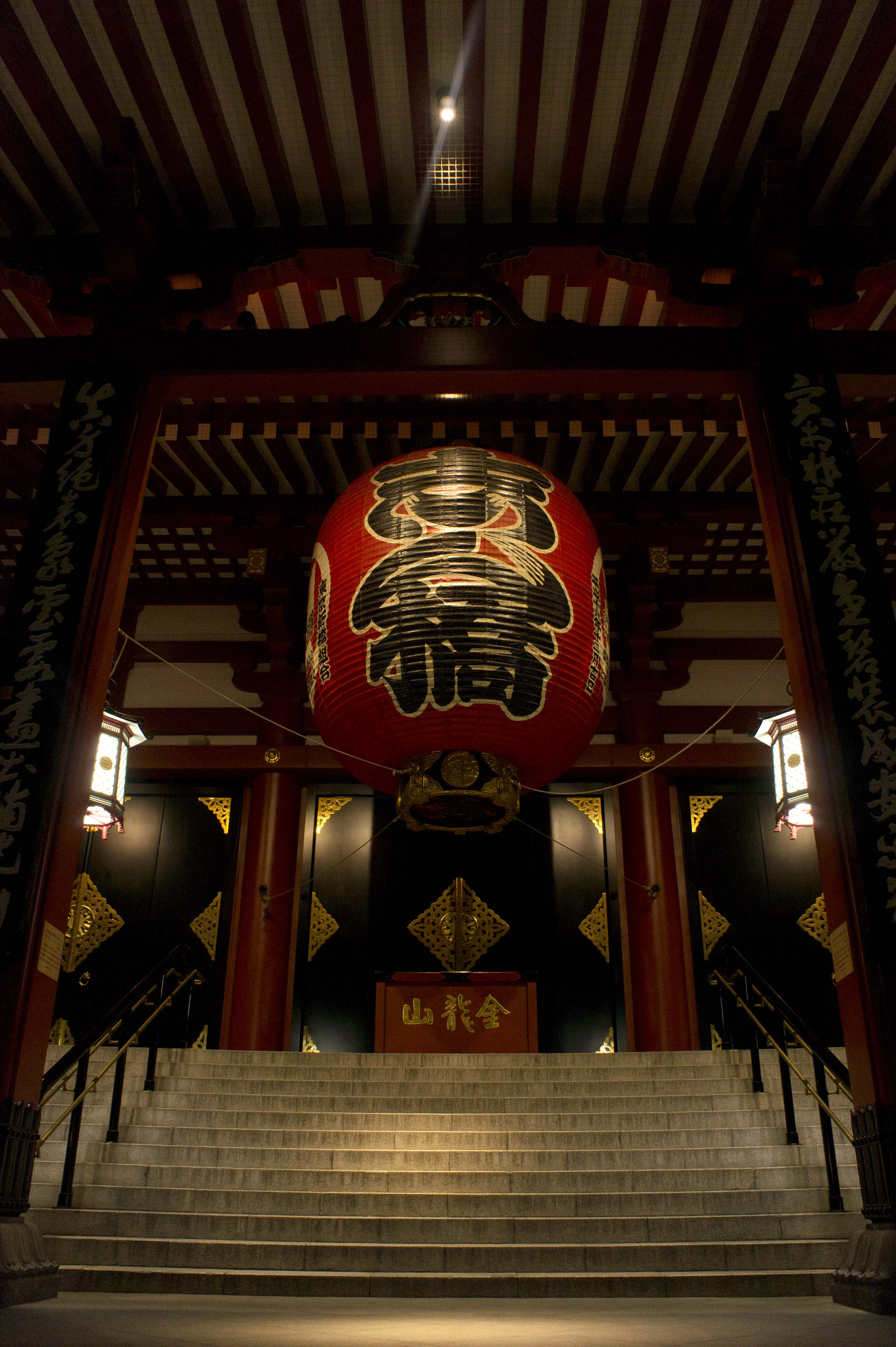 金龍山淺草寺